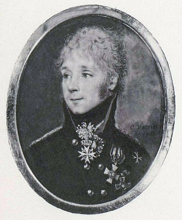 Дмитрий Петрович Резвой (1763—1823)